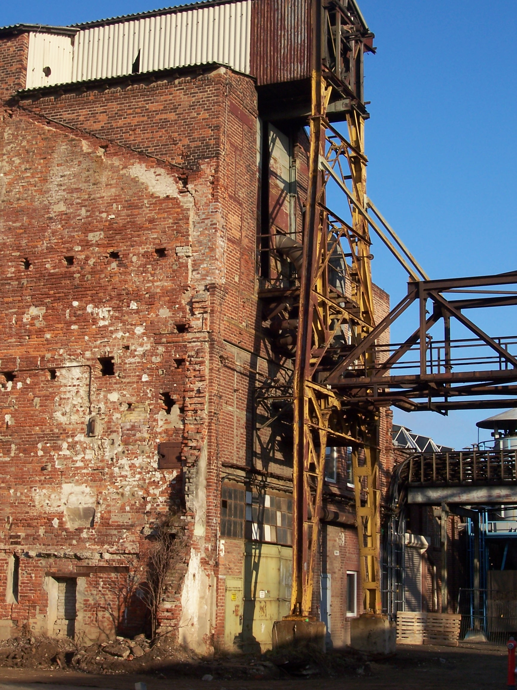 ECW-Gebäude, altes Kesselhaus, in den 1960er Jahren stillgelegt, 2007 abgebrochen